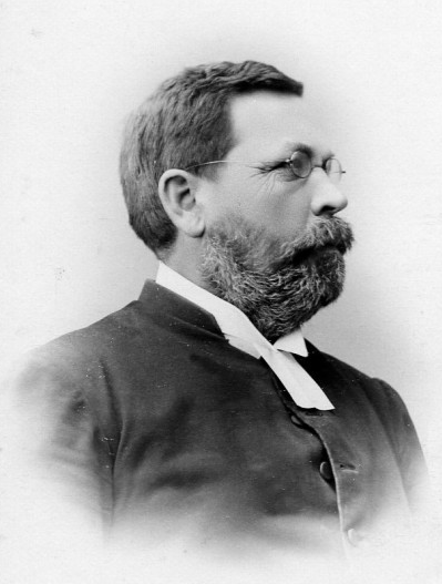 Porträtt av kyrkoherde Peter Werme